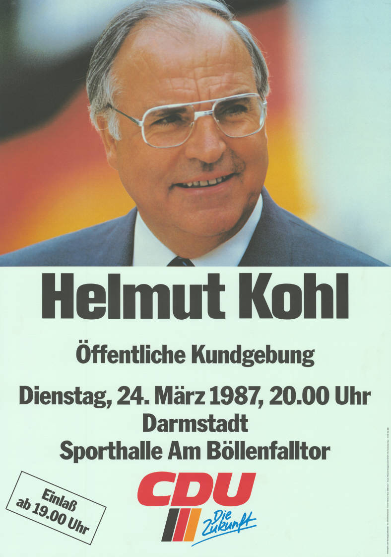 Helmut Kohl Öffentliche Kundgebung ... CDU Die Zukunft Abbildung: Porträtfoto - Nationalfarben Plakatart: Ankündigungsplakat Auftraggeber: CDU-Bundesgeschäftsstelle, Abt. Öffentlichkeitsarbeit, Konrad-Adenauer-Haus, Bonn Drucker_Druckart_Druckort: Kölnische Verlagsdruckerei GmbH, Köln, Rundschau-Haus Objekt-Signatur: 10-007 : 714 Bestand: Landtagswahlplakate Hessen (10-007) GliederungBestand10-18: Landtagswahlplakate Hessen (10-007) » CDU Lizenz: KAS/ACDP 10-007 : 714 CC-BY-SA 3.0 DE